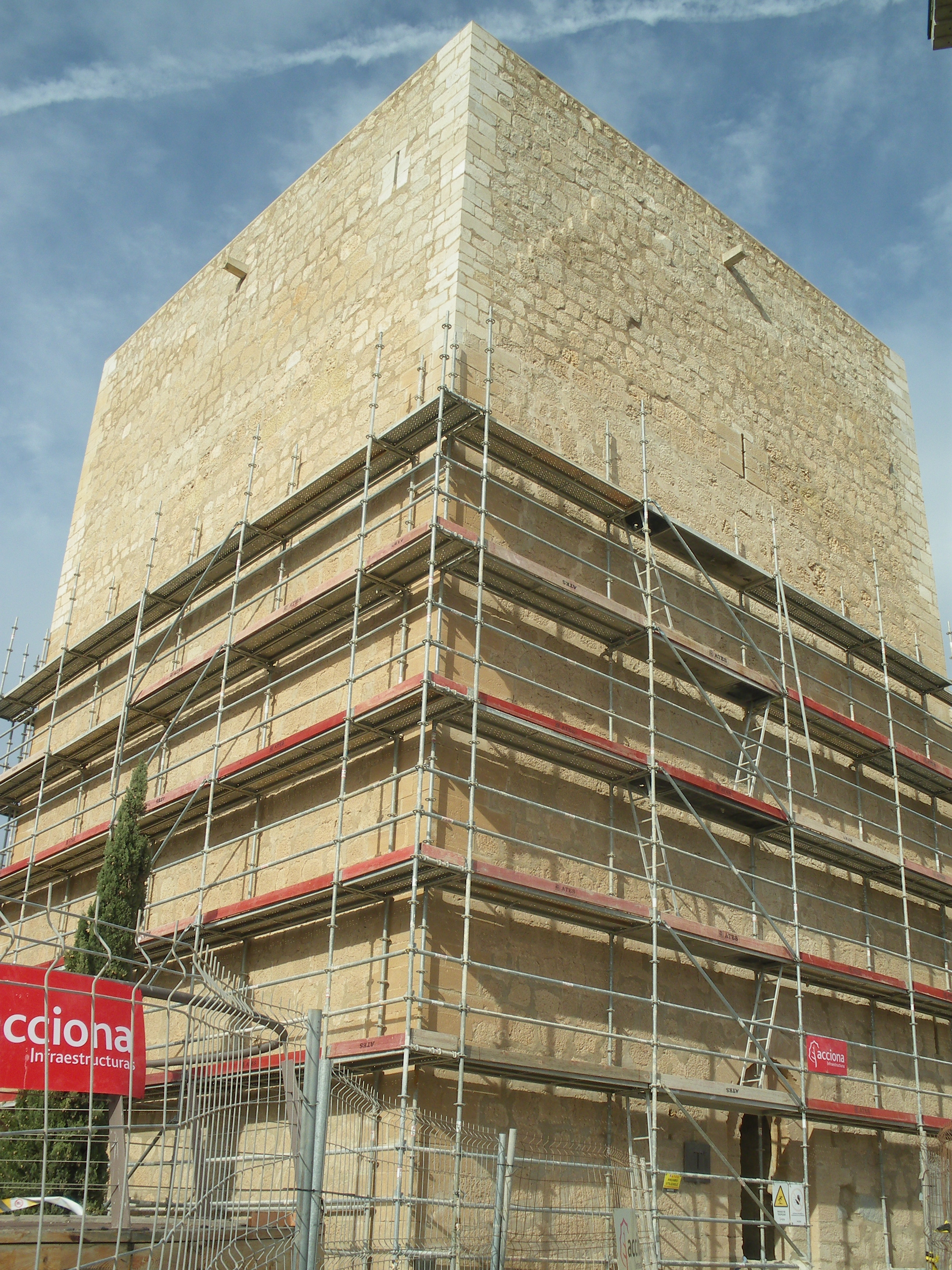 Restauración de la torre del Espolón tras los daños sufridos por el terremoto de 2011. Castillo de Lorca, Región de Murcia, España.